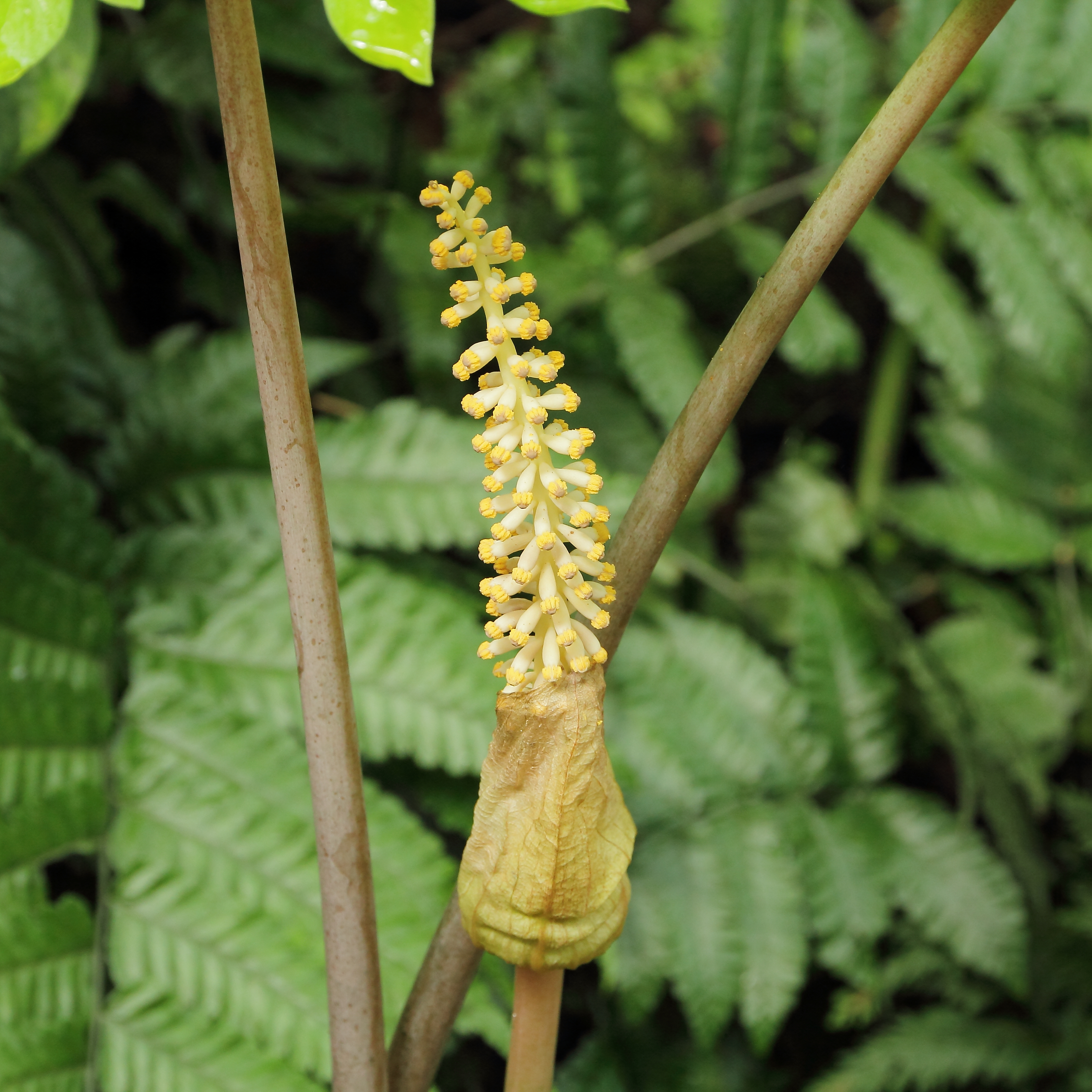 Taccarum weddellianum i Göteborgs Botaniska Trädgård.